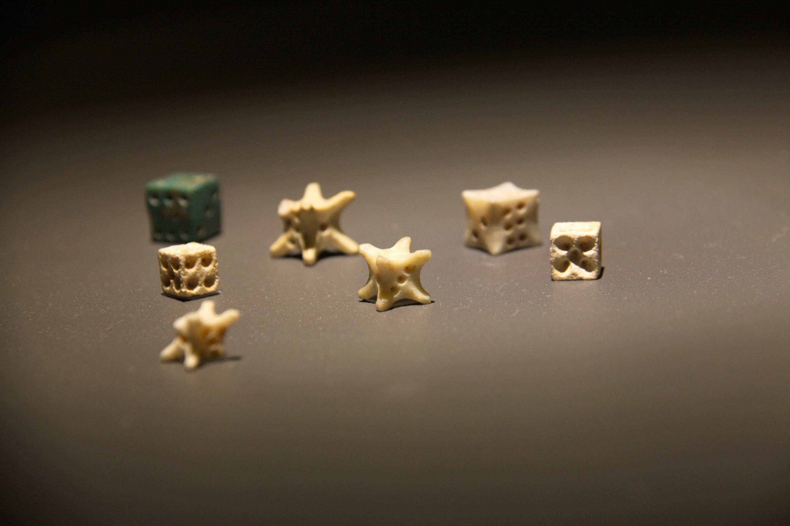 Jaciment arqueològic del Born (Barcelona, 1717). Joguines, daus